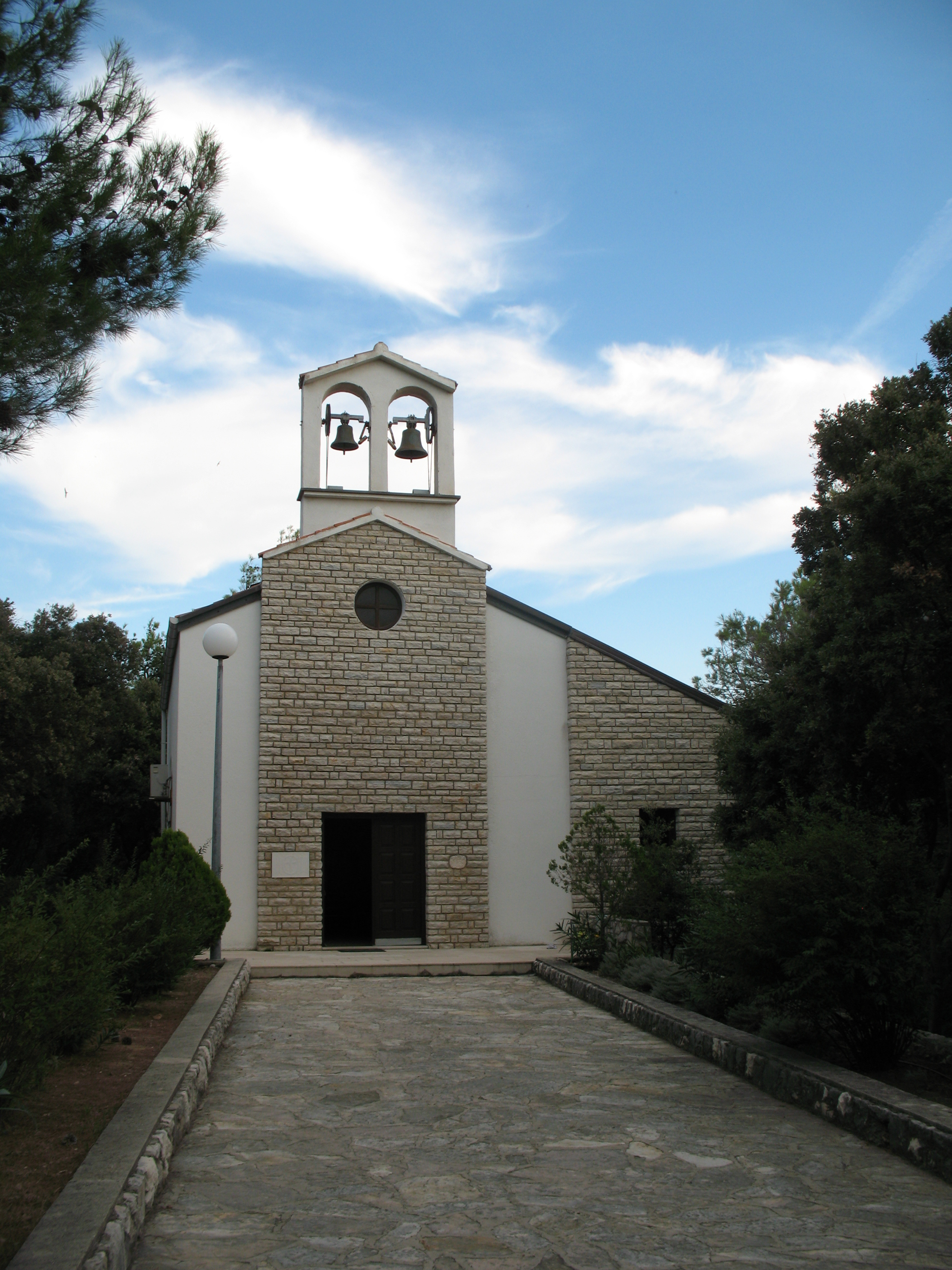 Šimuni